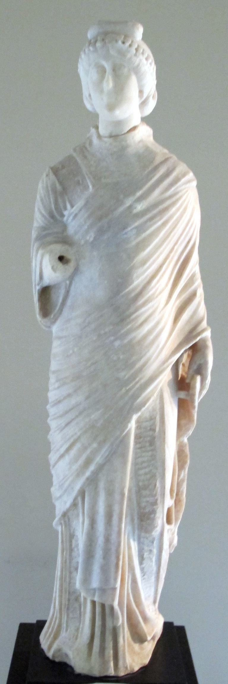 Arte tardoromana (costantinopoli), statuetta dell'imperatrice aelia flacilla o pulcheria, da cipro, 380-90 o 410-20